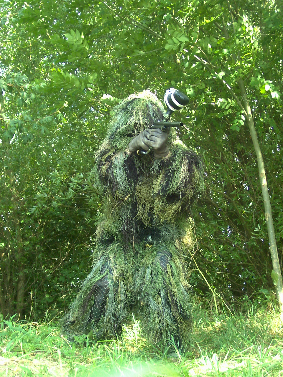 Bushrag=Tarnanzug geeignet für Paintball,Jagd usw..